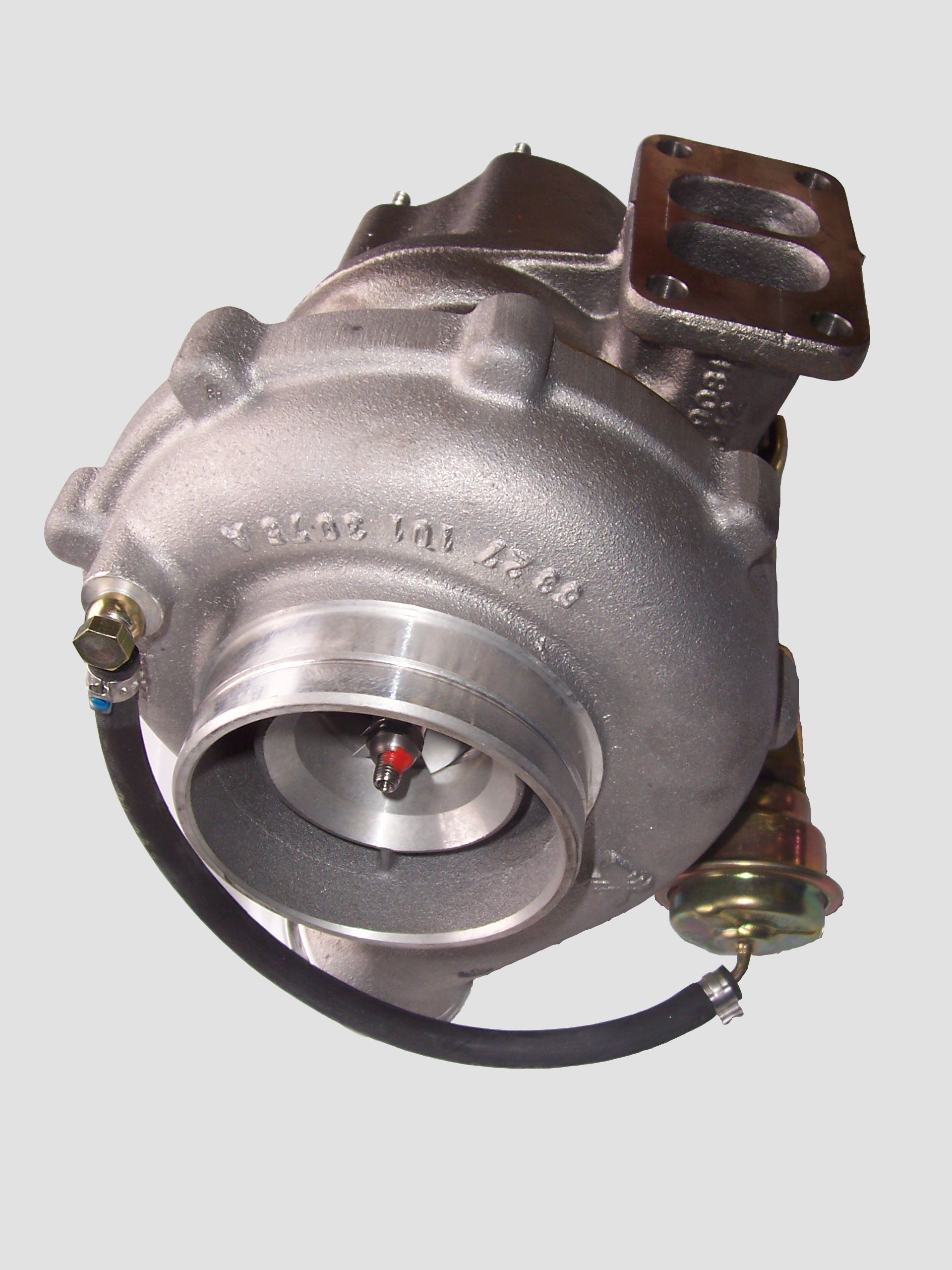 diesel engine turbocharger